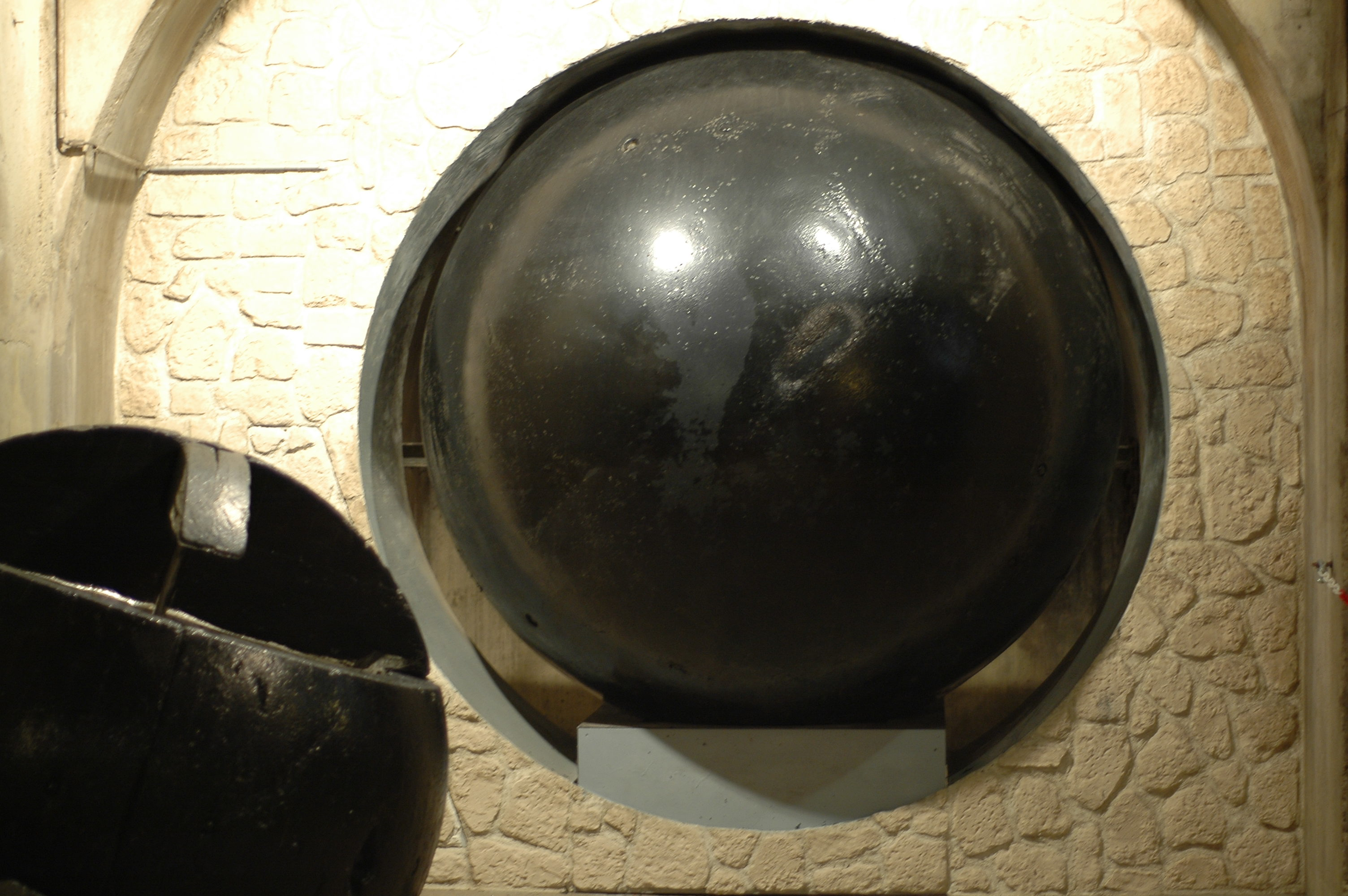 Musée des égouts de Paris. Boule de nettoyage